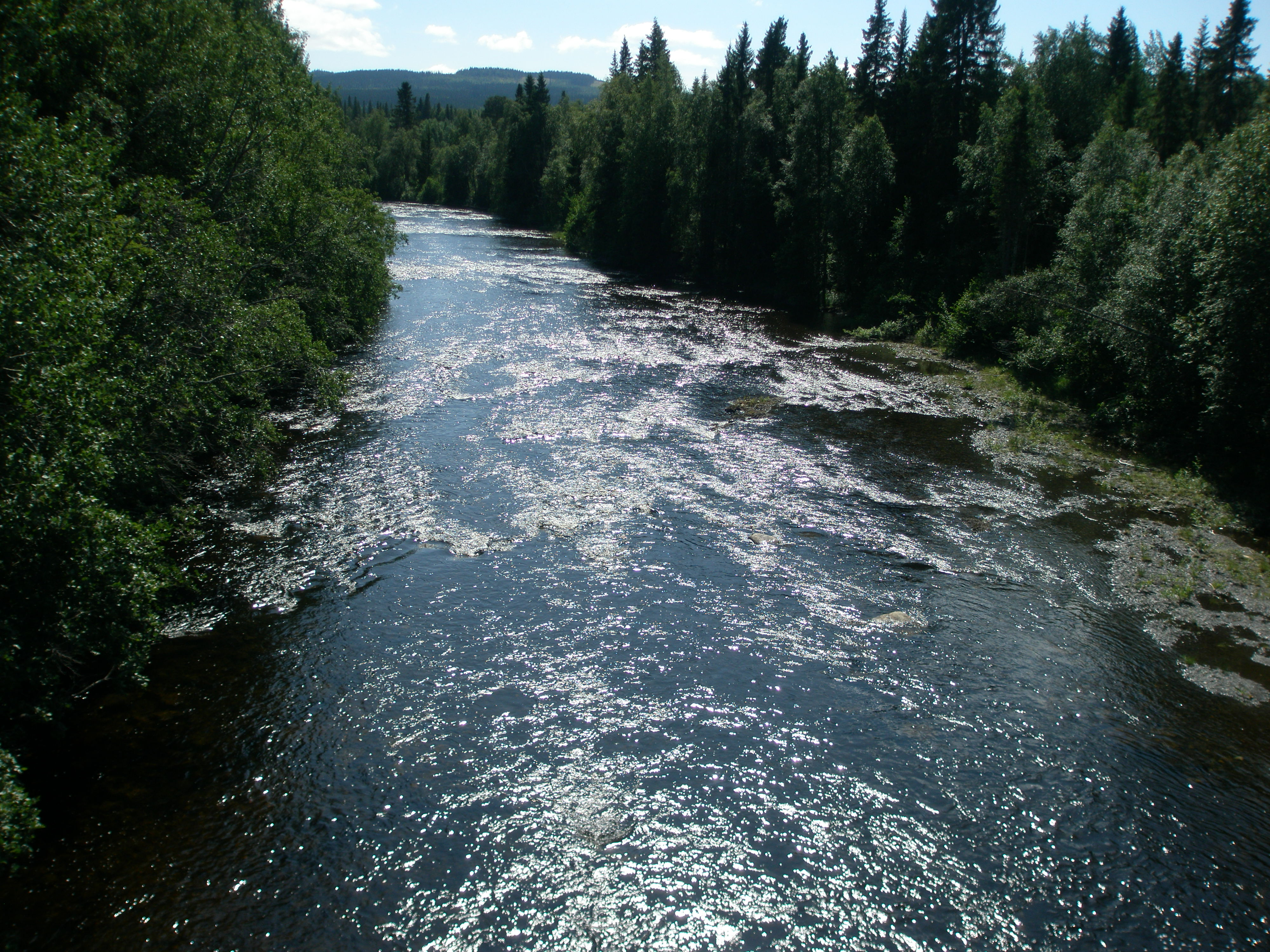 Nästån i Åflo by, Offerdals socken, Krokoms kommun, Jämtland, Sverige.